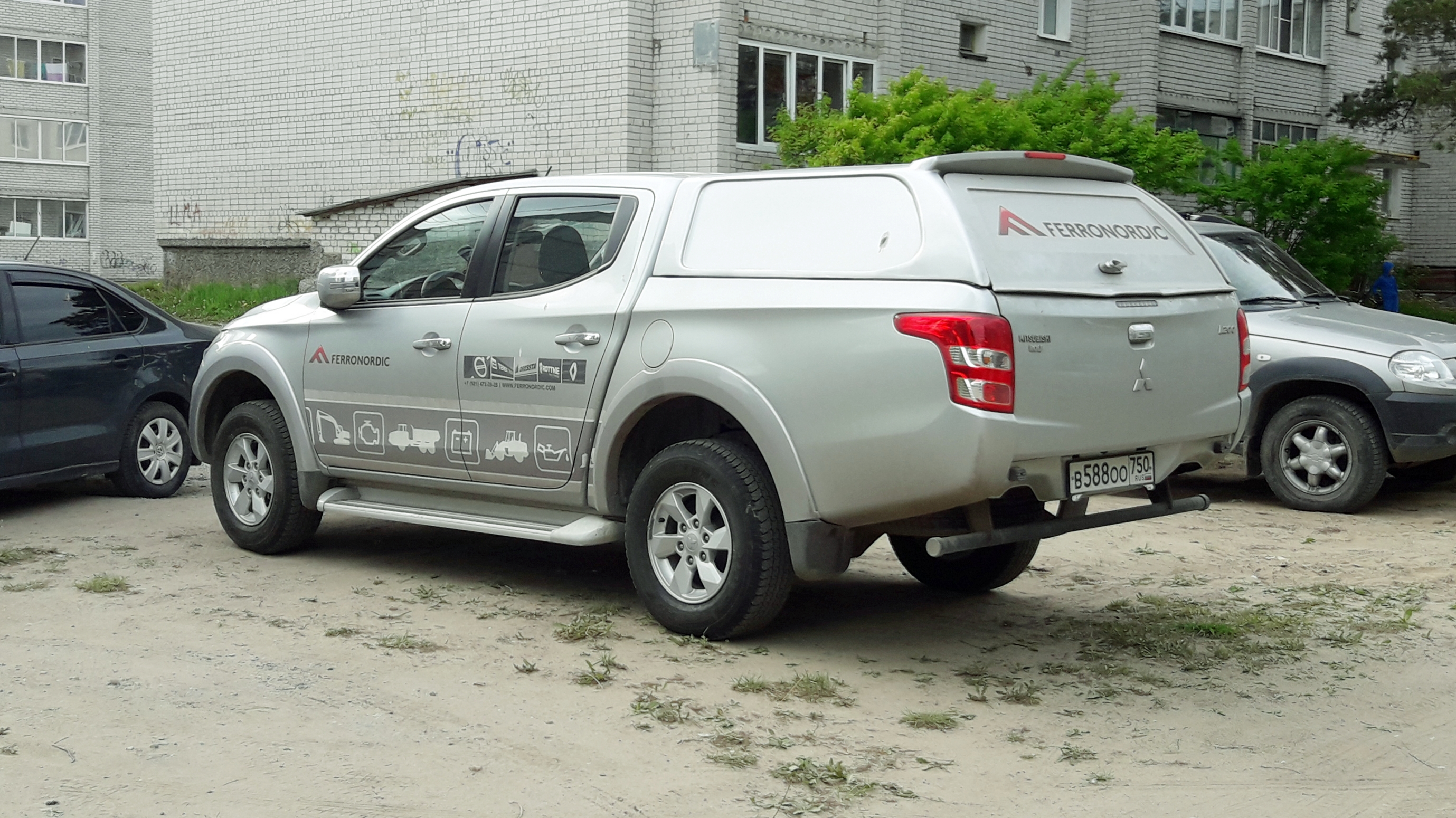 Автомобиль компании Ferronordic - представительства Volvo в России